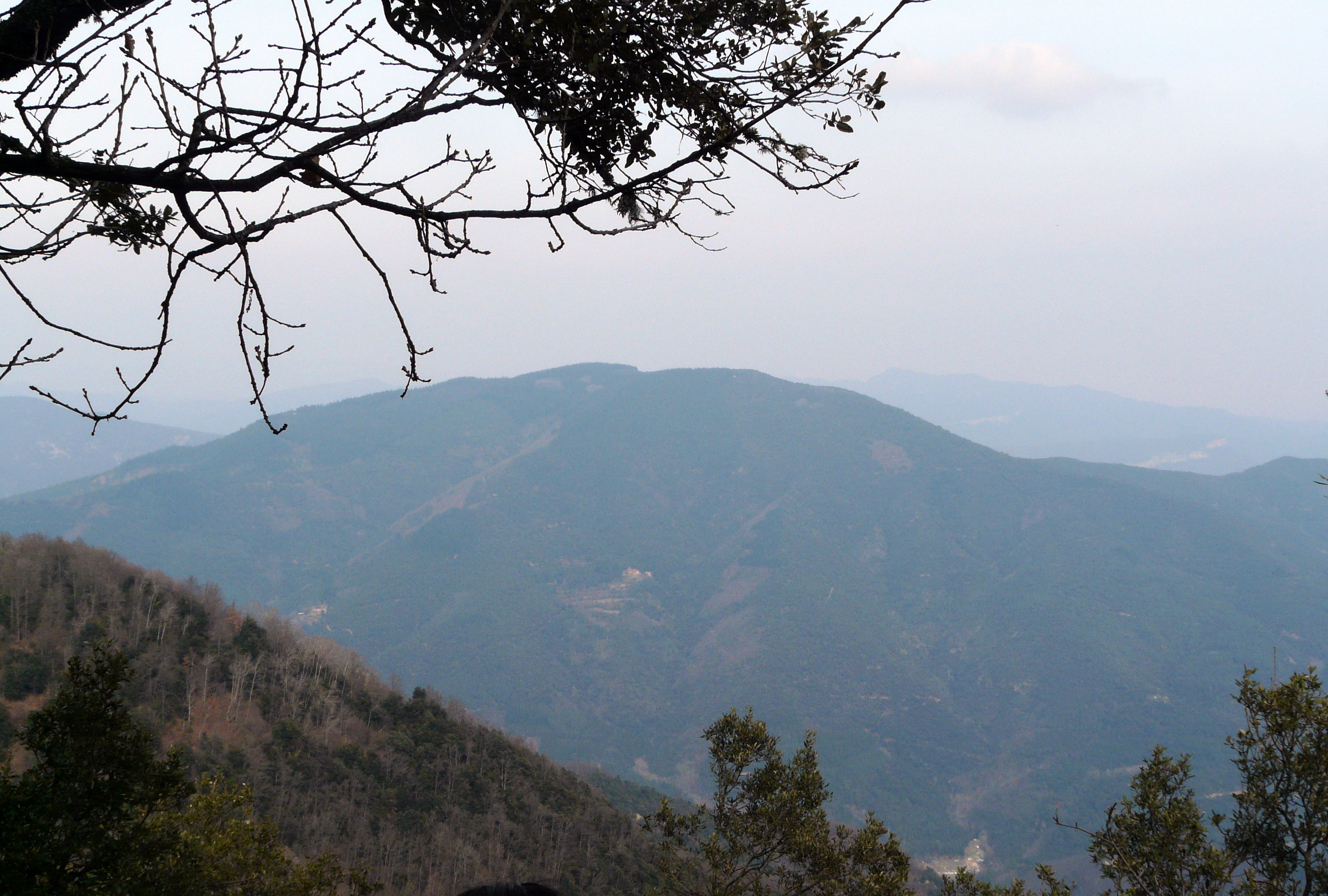 Sant Gregori, muntanya de la Selva, vista des de prop de Sant Miquel de Solterra.